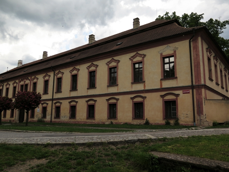 Zámek Načeradec, Načeradec 1, náměstí, Načeradec.